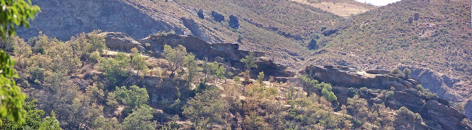 La Mezquita de Busquístar vista desde Atalbéitar